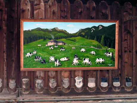 Poya : Estavannens, Fribourg, Switzerland.